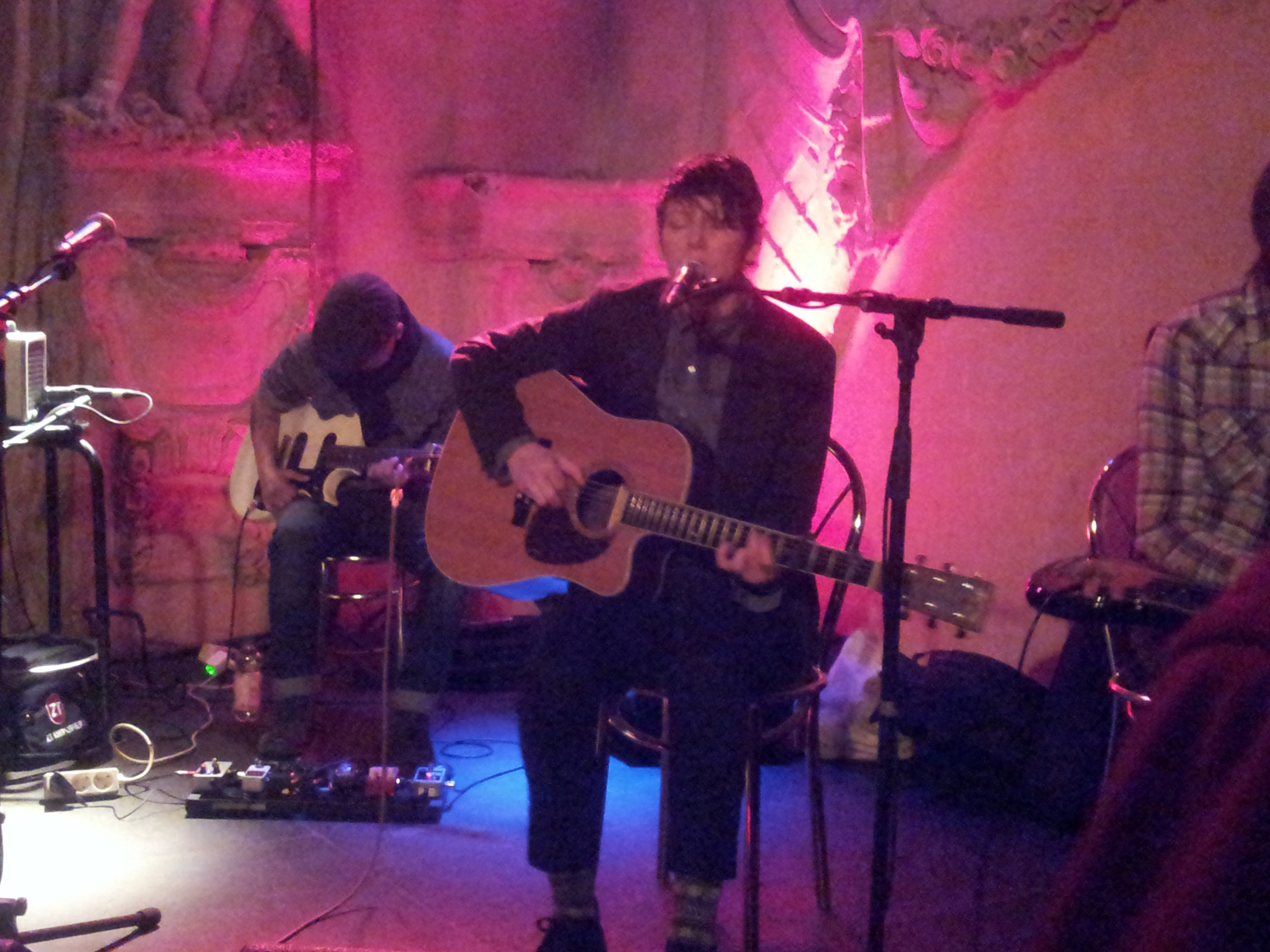 Die amerikanische Folk-Sängerin Chris Pureka in der Prinzenbar, St. Paul, Hamburg